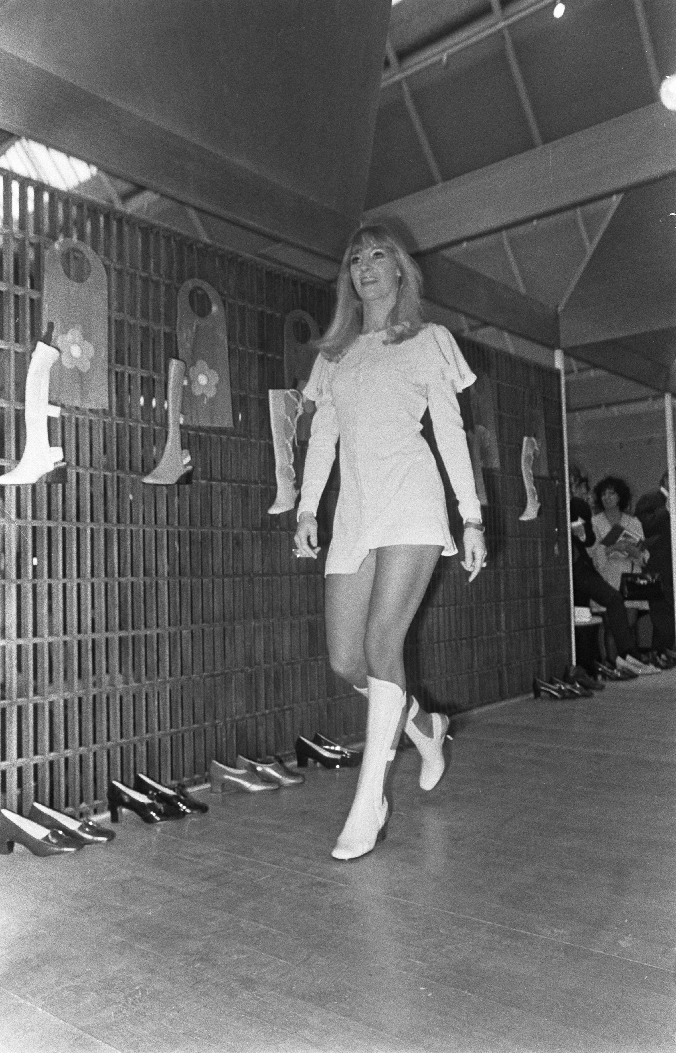 Collectie / Archief : Fotocollectie Anefo Reportage / Serie : [ onbekend ] Beschrijving : Mary Quant toont haar zomerlaarzen op schoenenbeurs te Utrecht de show Datum : 24 maart 1969 Locatie : Utrecht Trefwoorden : schoenenbeurzen Fotograaf : Nijs, Jac. de / Anefo Auteursrechthebbende : Nationaal Archief Materiaalsoort : Negatief (zwart/wit) Nummer archiefinventaris : bekijk toegang 2.24.01.05 Bestanddeelnummer : 922-2259